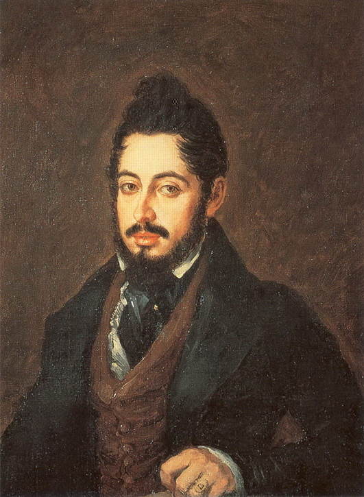 Retrato del escritor, periodista y politico español Mariano José de Larra (1809-1837).